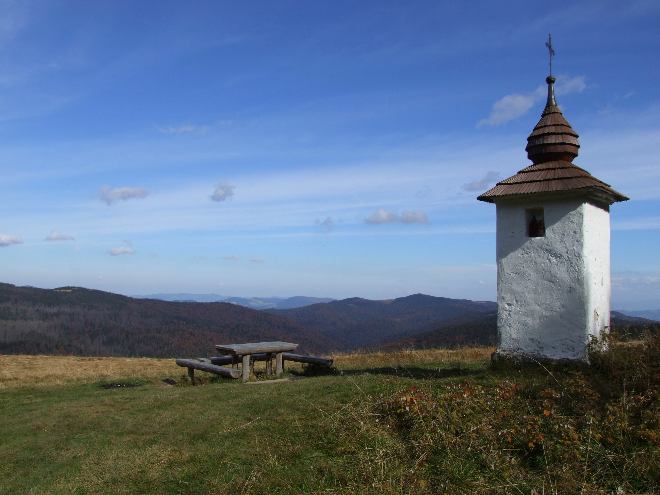 Polana Jaworzyna Kamienicka (Gorce)